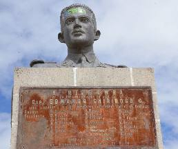 monumento al capitan Edmundo Chiriboga